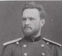 Бергенгейм Эдуард Эдуардович (1884-1893)